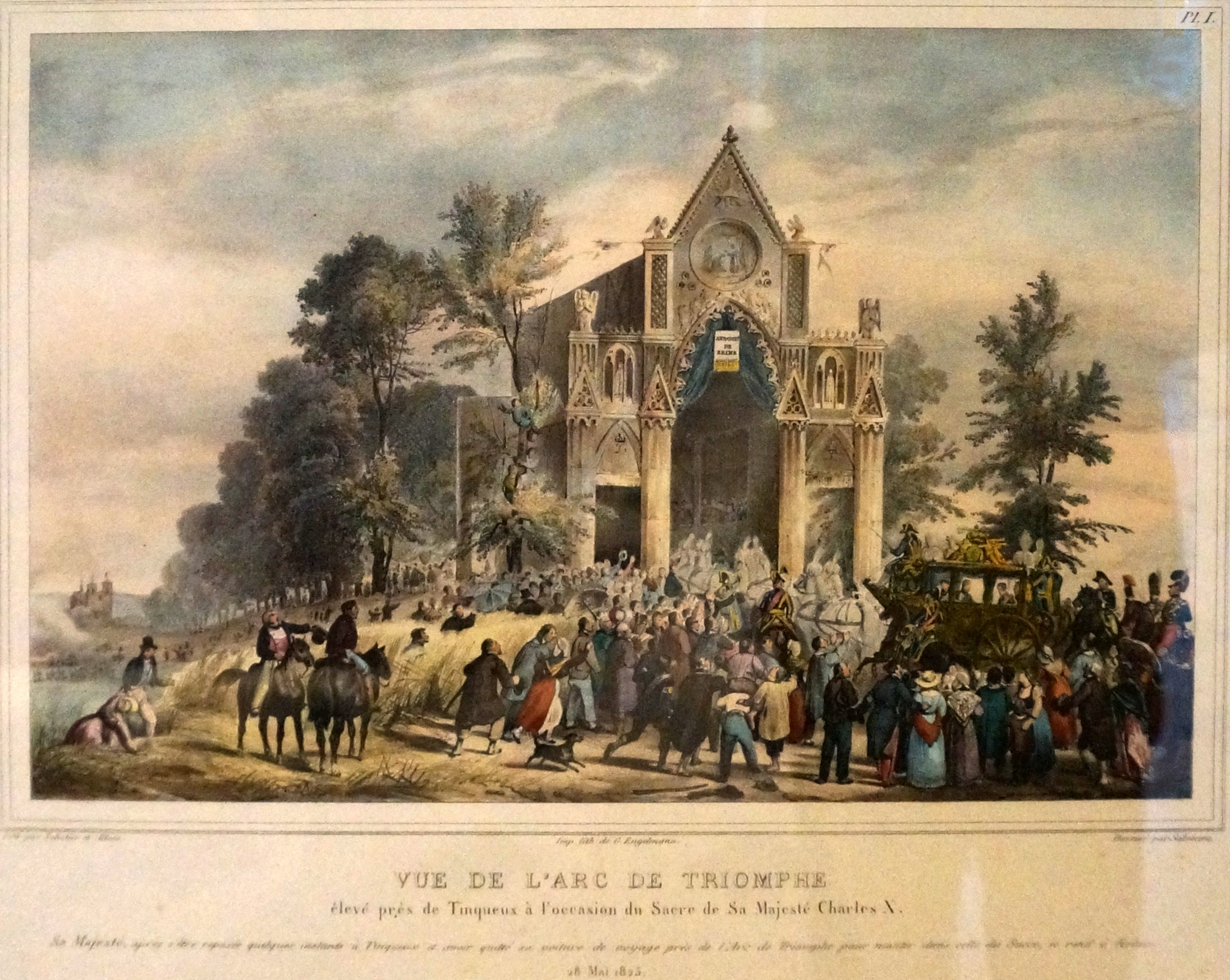 lors de l'Exposition « Sacres Royaux, de Louis XIII à Charles X ».